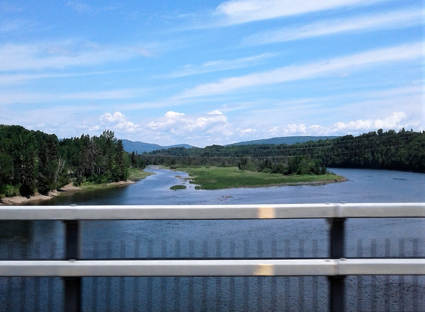 Rivière Cascapédia, vue de la route 132, regardant vers l'amont, Cascapédia-Saint-Jules, Québec